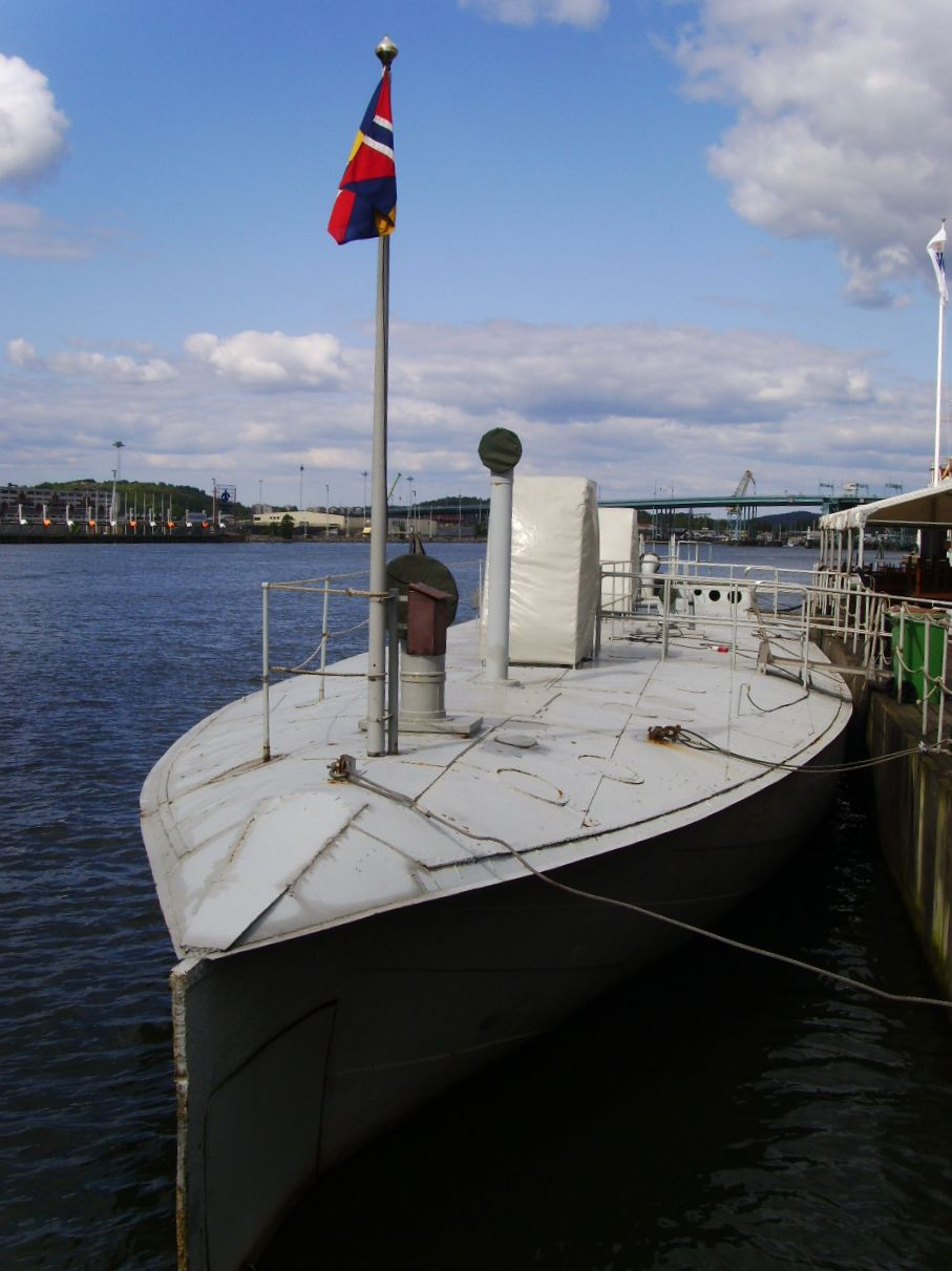 Monitoren Sölve som finns utställd på Maritiman i Göteborg, levererades till svenska flottan 1875 av Motala varv i Norrköping. Den ingick i en serie av sju monitorer för skärgårdsförsvaret. Finspongs bruk i Finspång bestyckade monitoren med bland annat den svenska marinens första bakladdade och räfflade kanontyp vid namn Finspong 24 kanon M/69. Den finns att beskåda vid kajen invid Maritiman i Göteborg.